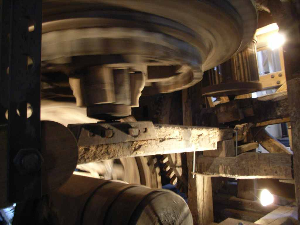 "Königsrad" zum Antrieb der Getreidemahlsteine in der Schrofmühle, Wegberg-Rickelrath (NRW)